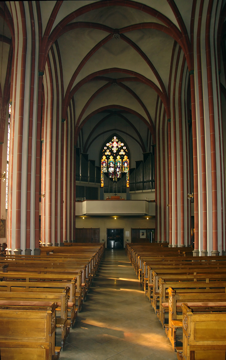 Propsteikirche St. Johann in Bremen.